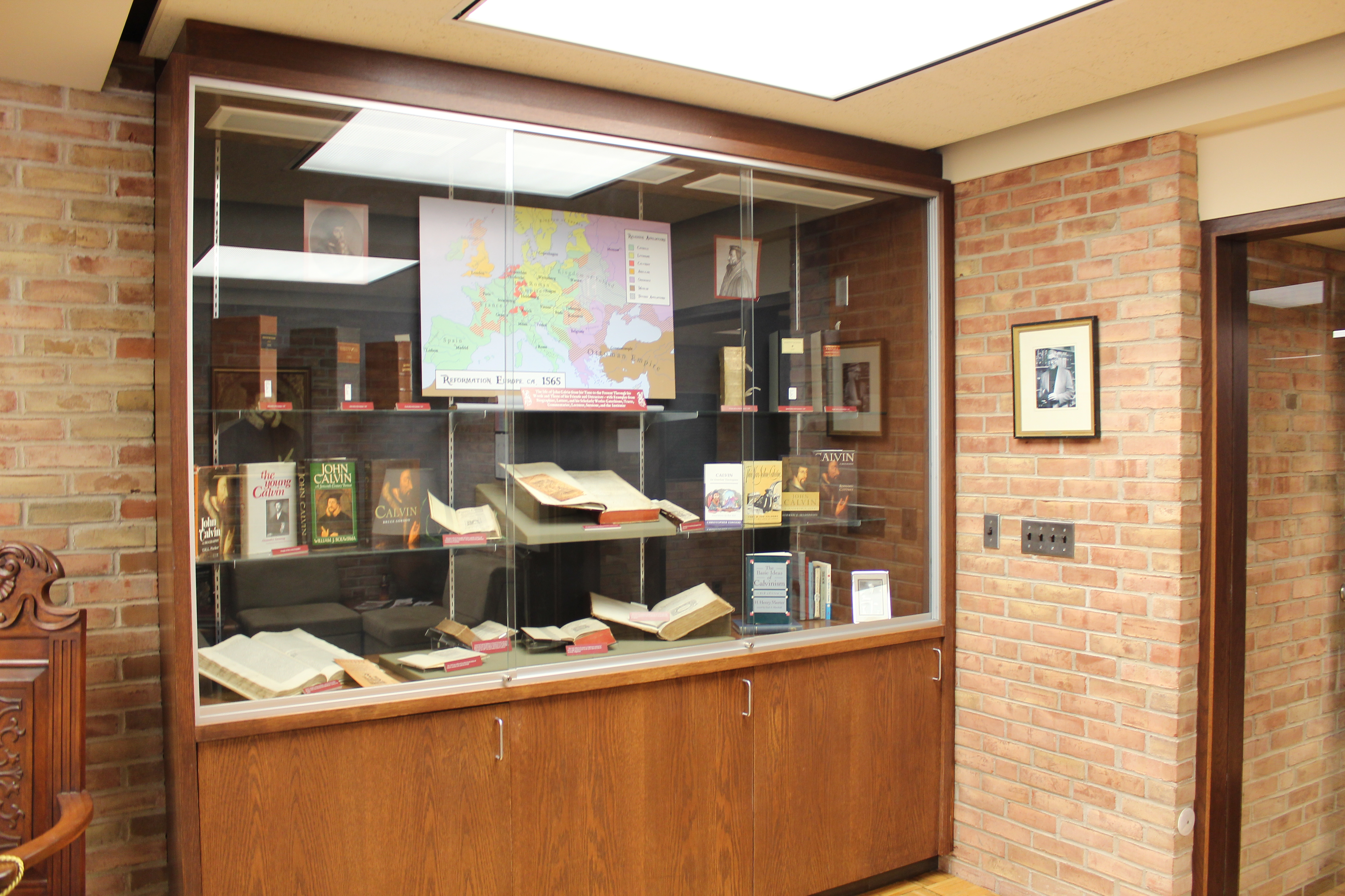 칼빈의 원전이 전시된 헨리미터센터칼빈전문연구소